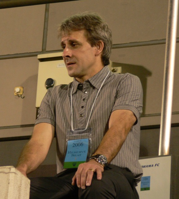 真上にいた！